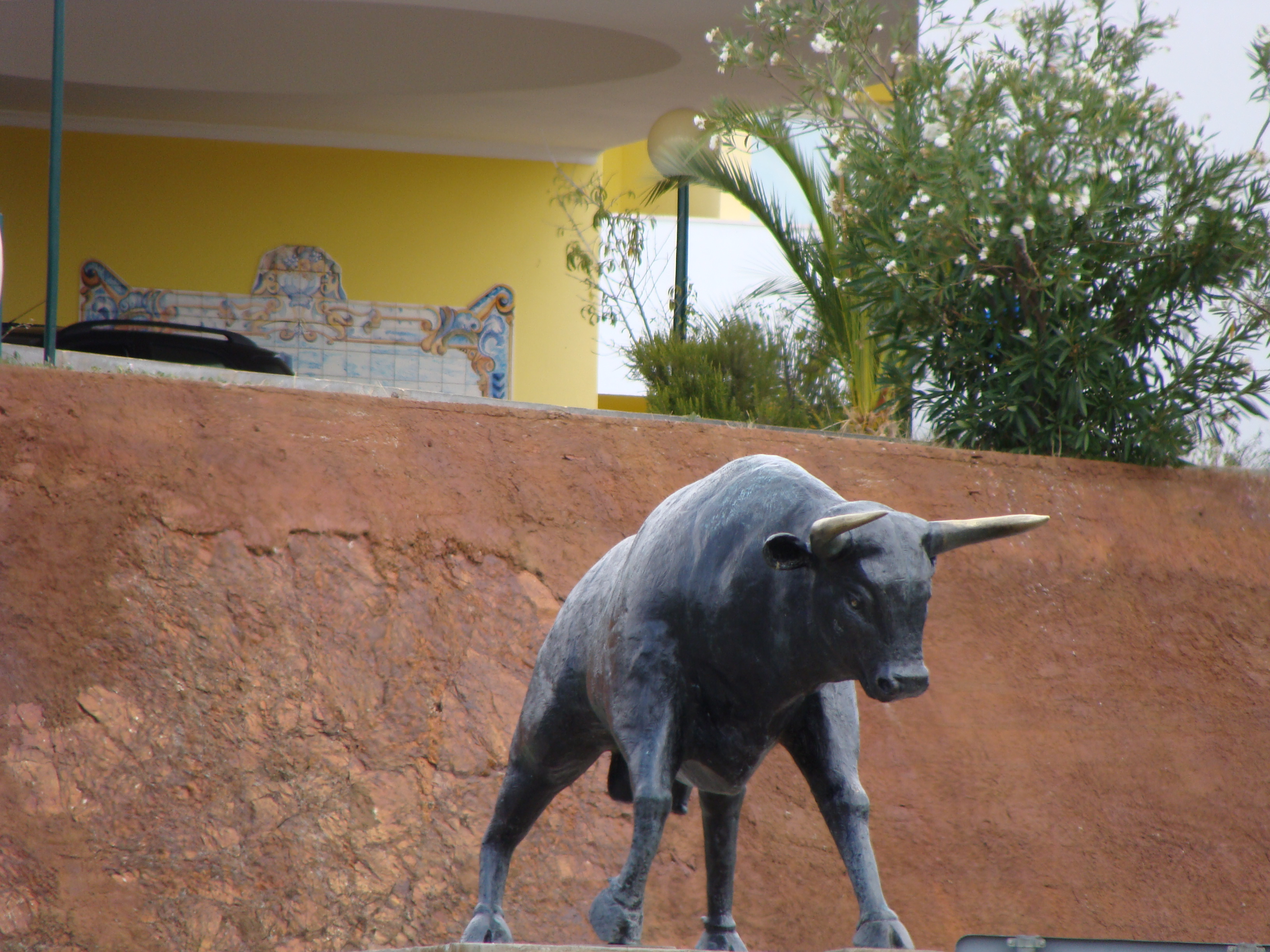 Taureau sur le rond-point d'entrée de la ville de Barrancos direction l'Espagne